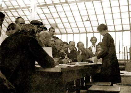 Афанасьева Елена Александровна. Защита диплома во ВХУТЕИНе. 1929.